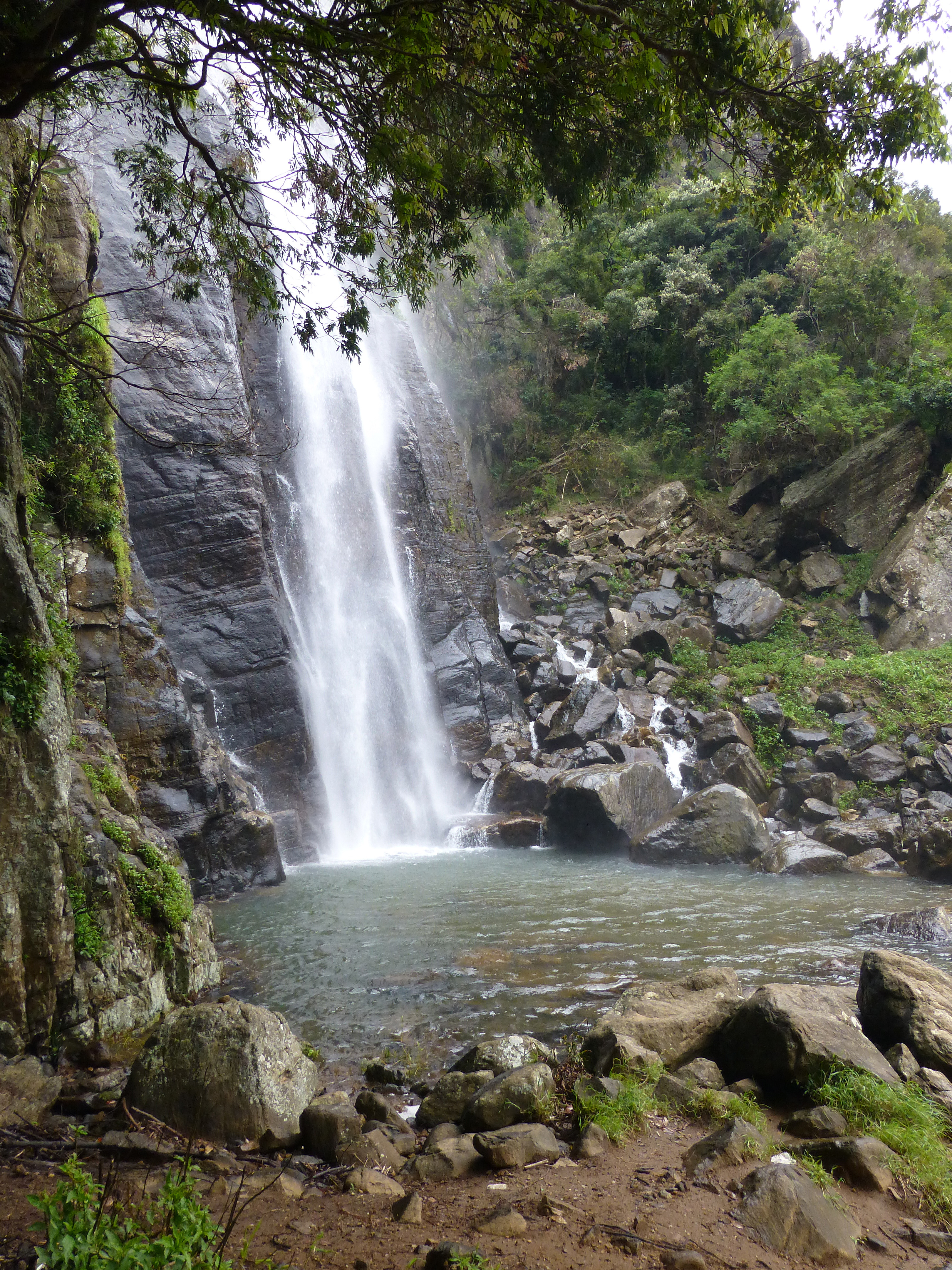 Bambarakanda Falls (Sri Lanka)